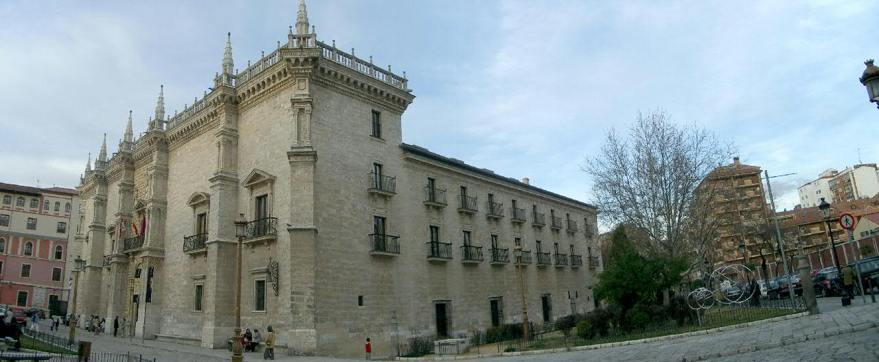 Expléndido palacio renacentista de finales del s.XV en el que se alojan los órganos de gobierno de la Universidad de Valladolid (y su museo, el Muva). Resulta curioso pensar que su construcción coincidió en el tiempo con la del Colegio de San Gregorio (sede del Museo Nacional de Escultura); tan diferentes ambos.